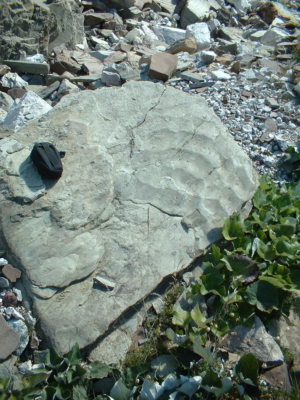 Blocco di Membro di Siusi della formazione di Werfen con ripple da onda e fossili di Claraia Clarai